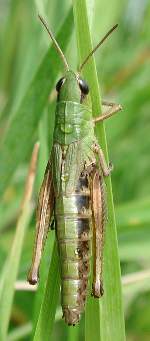 Chorthippus parallelus, f., Gemeiner Grashüpfer, Weibchen, NSG Kirchwerder Wiesen, Elbmarsch bei Hamburg, Deutschland